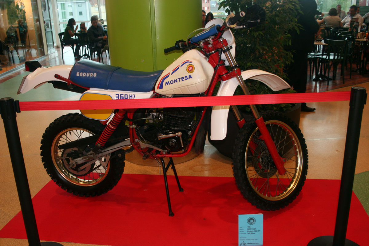 Montesa Enduro 360 H7, 1984 349,60 cc.